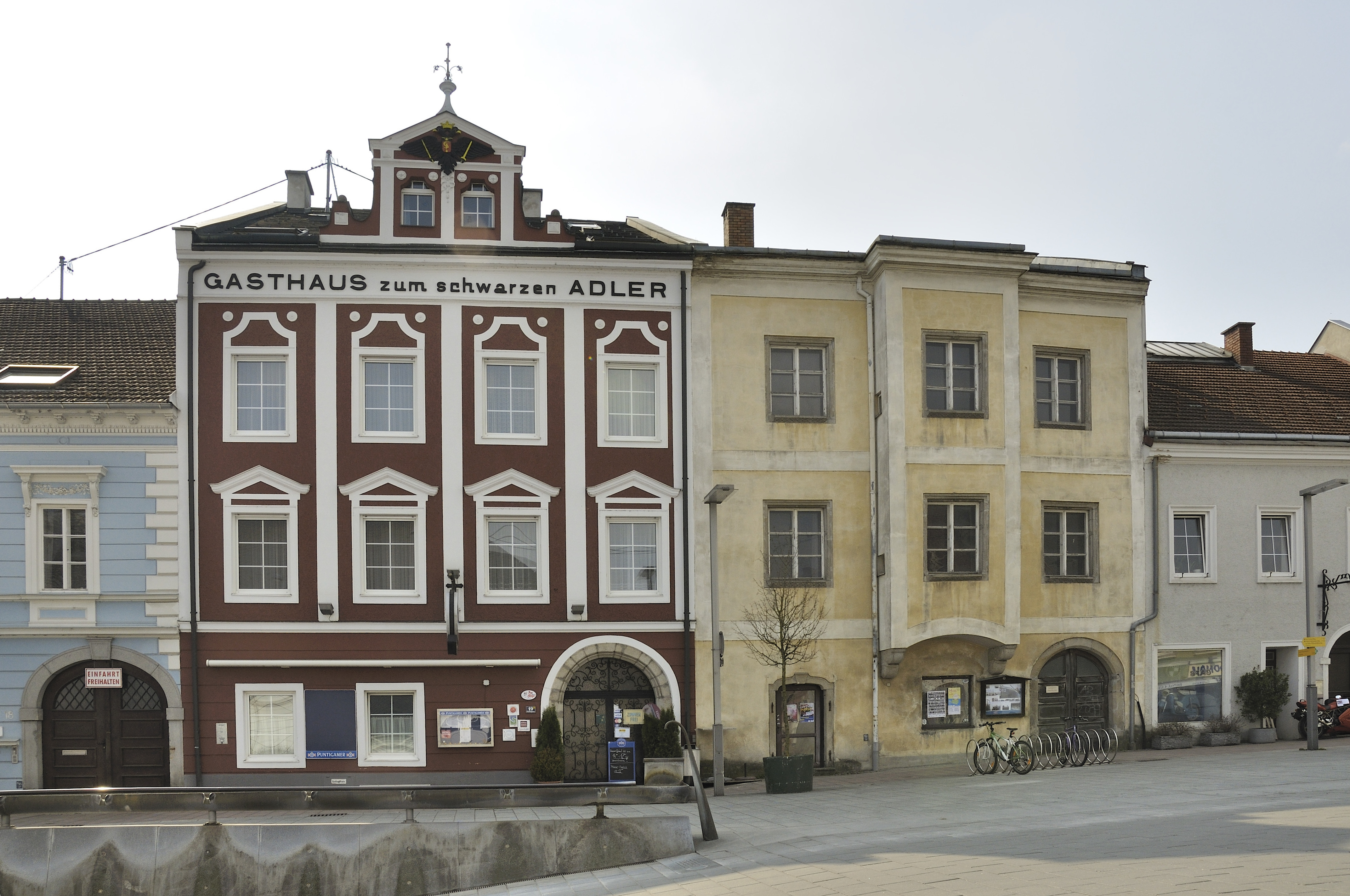 Bürgerhaus, Bootshaus, Schwarzenadlerhaus